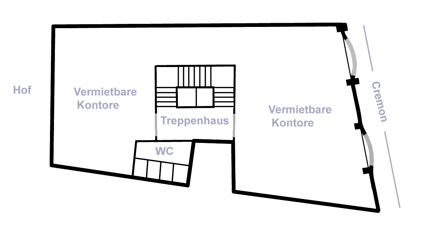 Hamburg-Altstadt, Cremonhaus Grundriss Vorderhaus , Cremon 10 bis 11, Foto: 2016